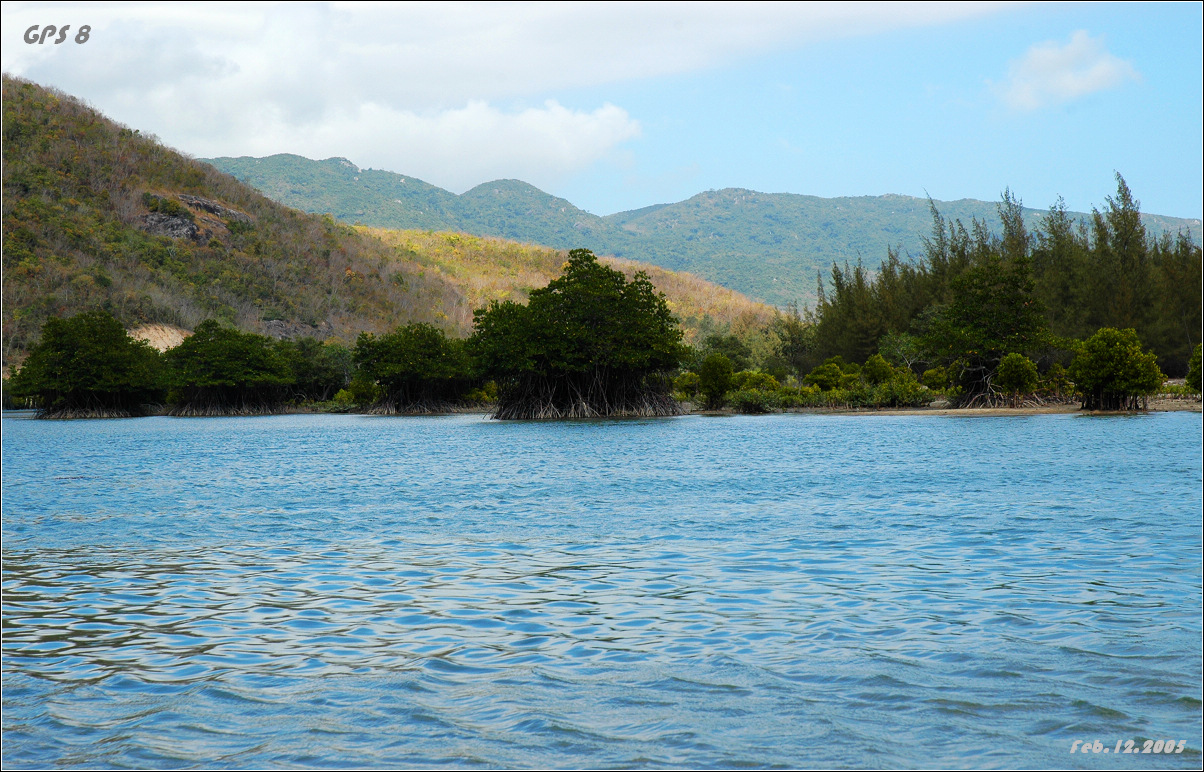 亚龙河红树林2005